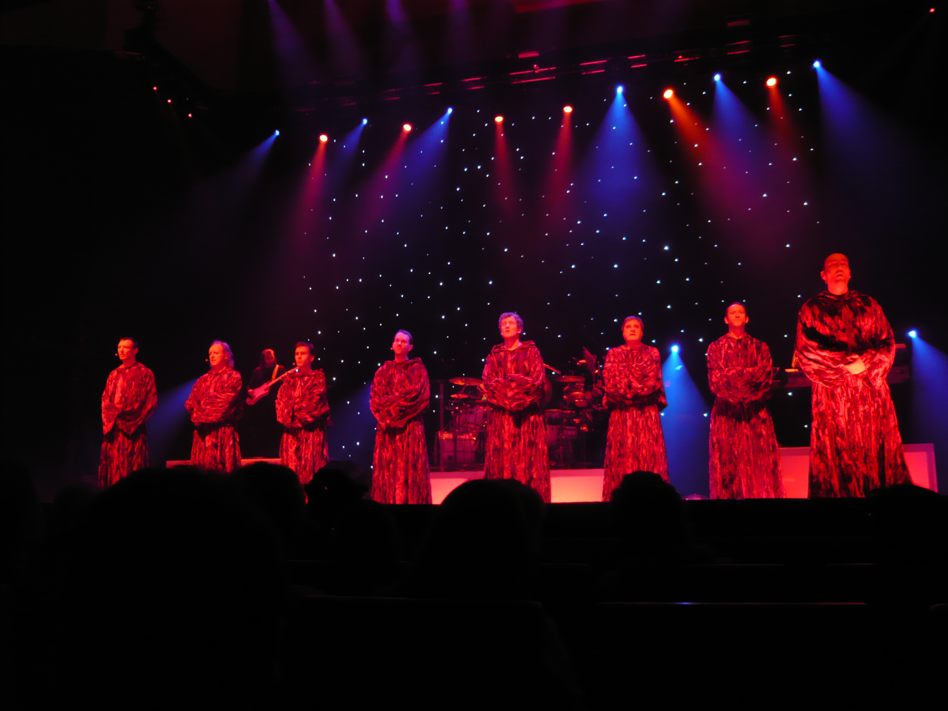 Gregorian und Amelia Brightman live im Konzerthaus Freiburg